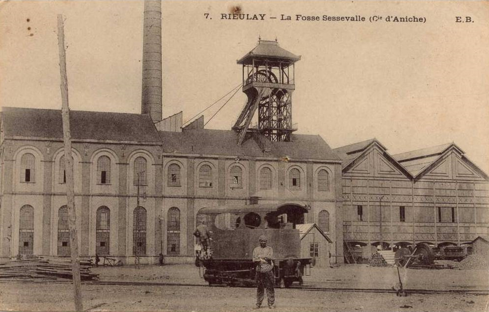 La fosse De Sessevalle était une mine souterraine de houille exploitée par la Compagnie des mines d'Aniche, puis par le Groupe de Douai au nord de Somain, près de Rieulay, dans le bassin minier du Nord-Pas-de-Calais, en France.